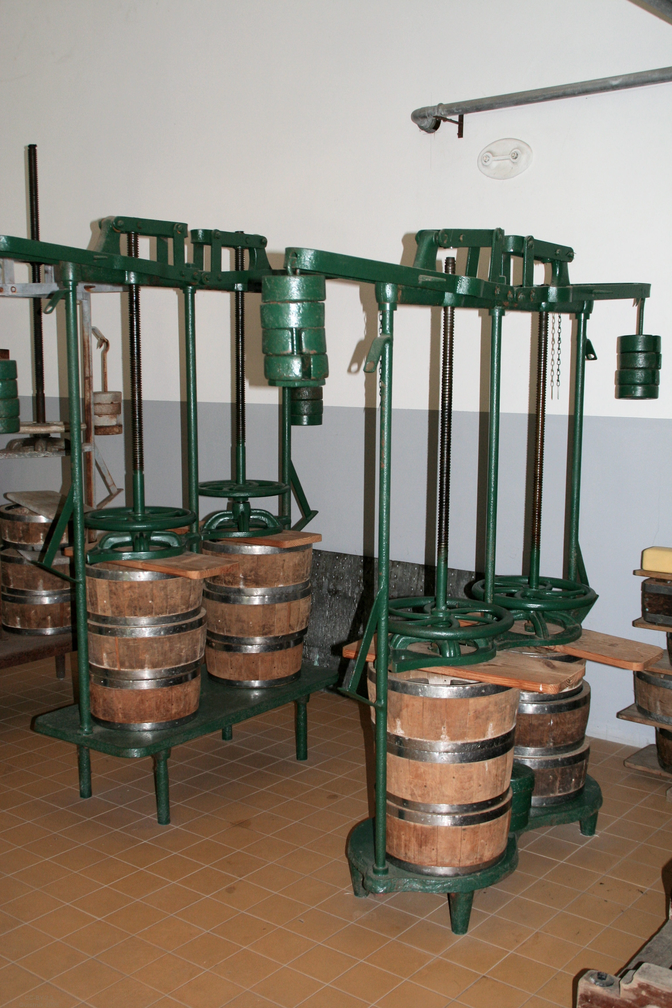 Kaaspersen in zuivelfabriek "Freia", Nederlands Openluchtmuseum. Eigen werk. Cheese presses in Open Air Museum, Arnhem